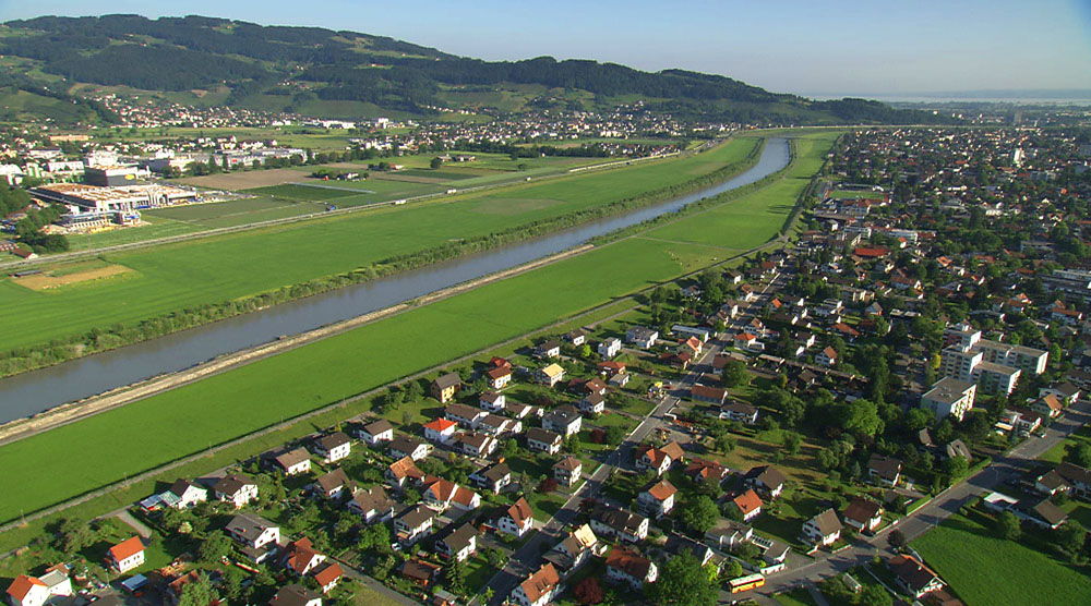 der Alpenrhein mit Lustenau (A, rechts) und Au (CH, links)